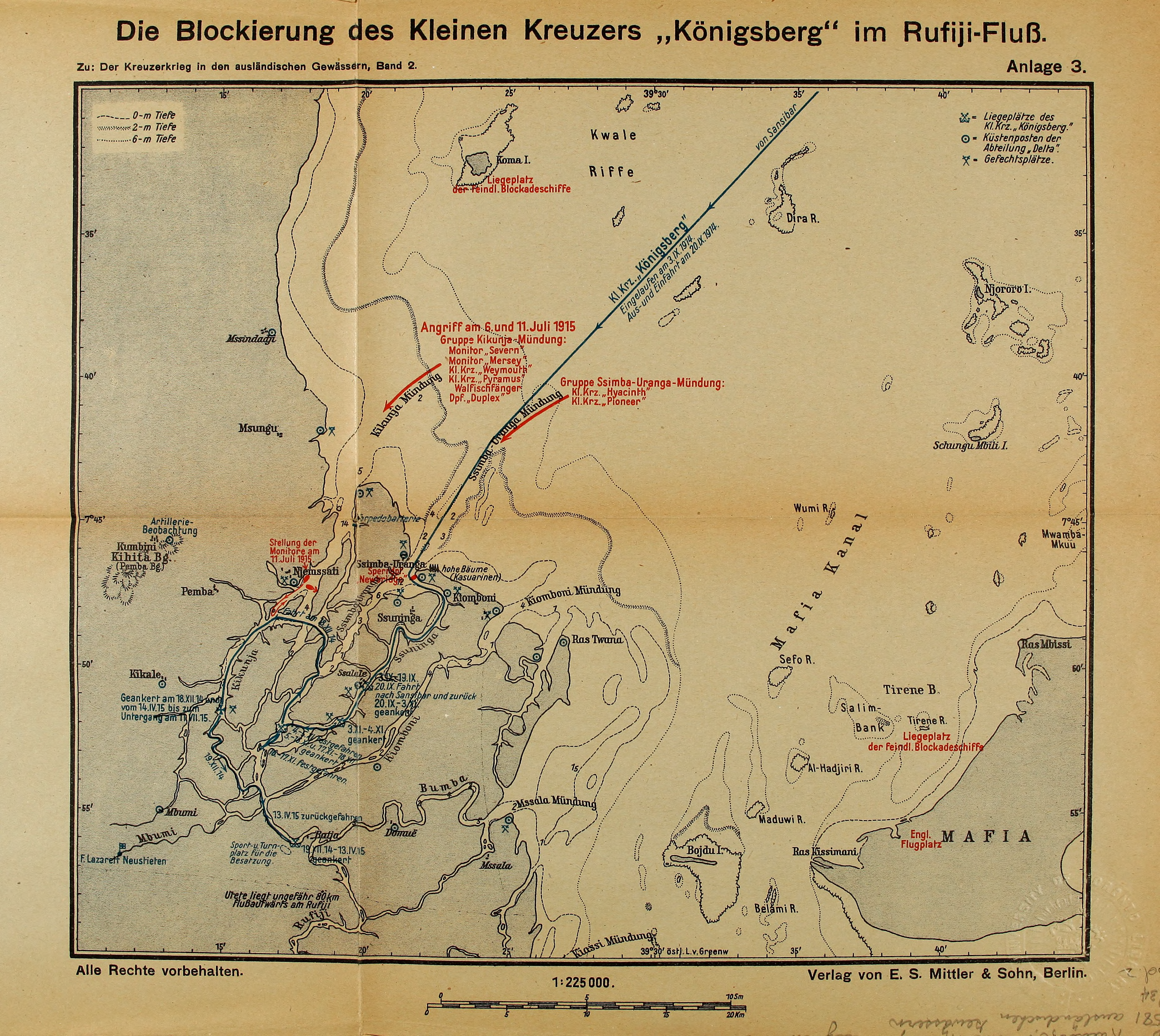 Die Blockierung des Kleinen Kreuzers Königsberg im Rufiji-Fluss